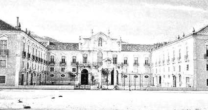 Esboço da fachada da Quinta do Correio-mor